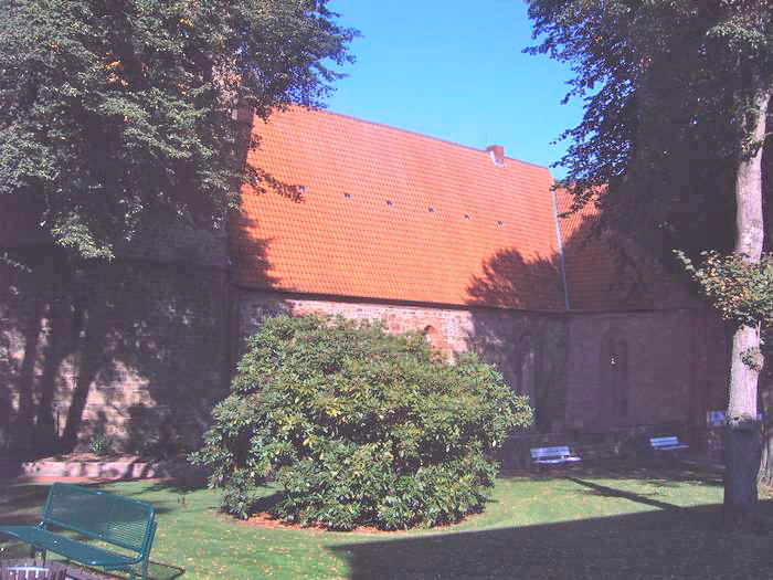 St.-Cyrakus-Kirche in Bruchhausen-Vilsen, Kirchvorplatz